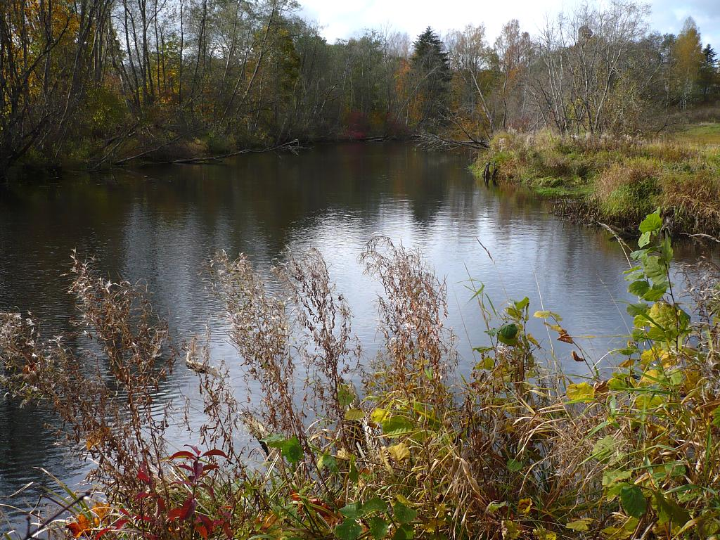 Sudas un Mergupes sateka - Lielās Juglas sākums 2008-10-12